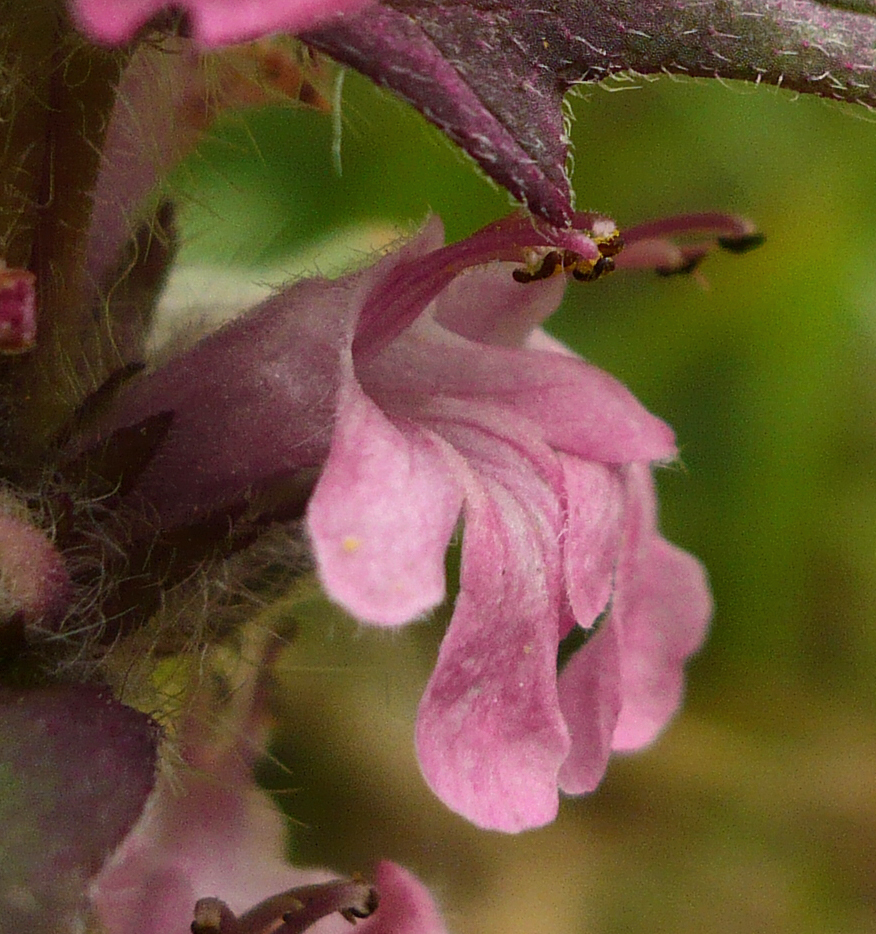 Живучка мохнатая, или женевская. Балка Пестрая Белгородская область.